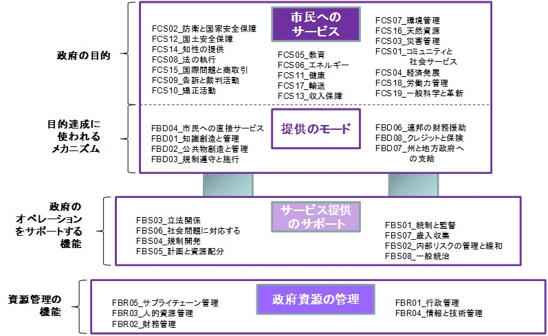 FEAの事業参照モデル（BRM） BRMは米連邦政府の事業運営について、それらを遂行する機関とは独立に記述する手段を提供する。そのモデルは上位のレイヤである。